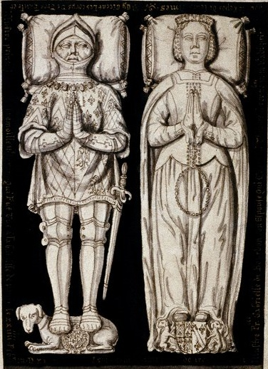 Louis de la Tremoille, d. 1524, and wife Gabrielle de Bourbon, d. 1516